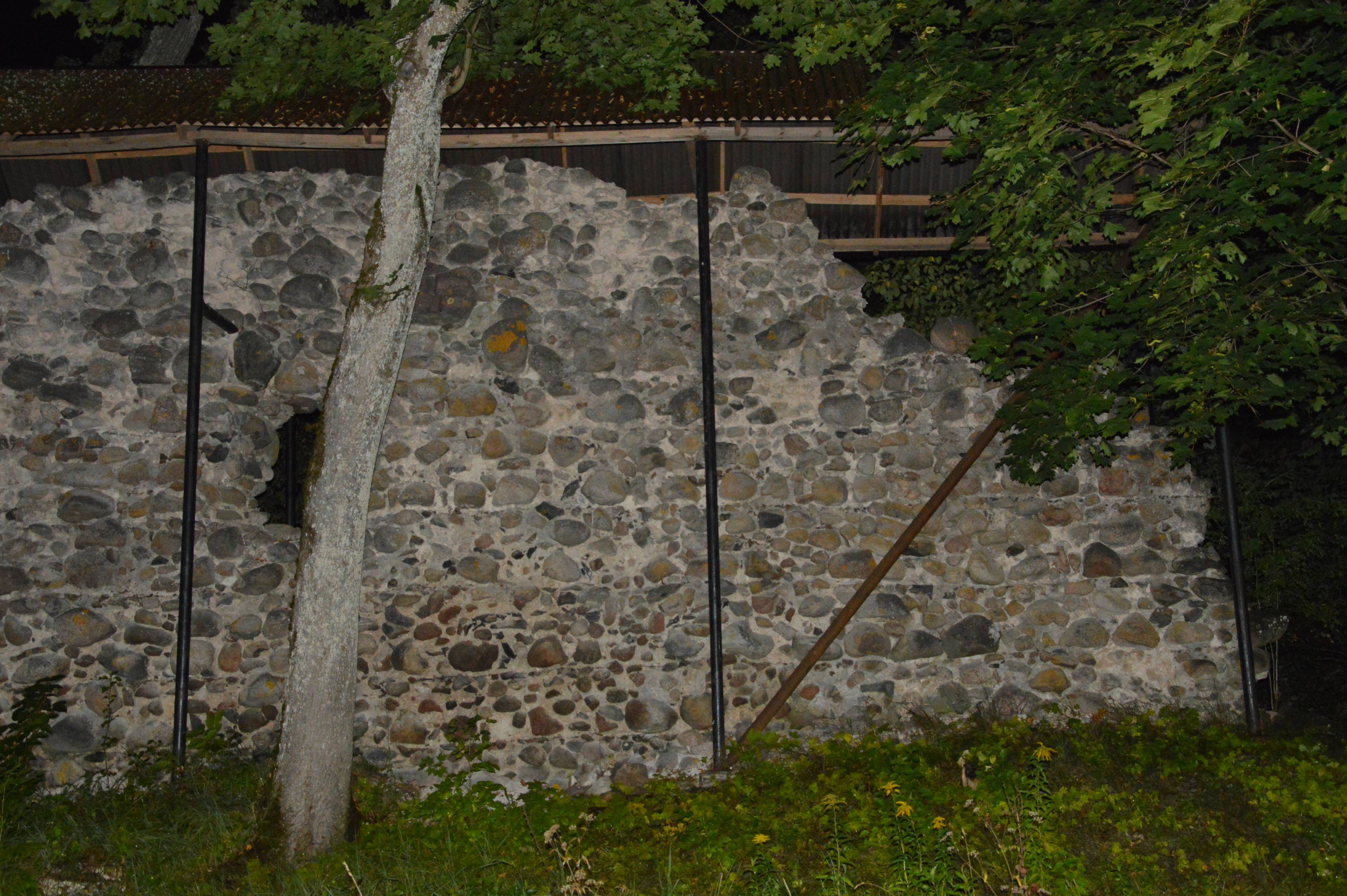 Smiltene piiskopilinnuse varemed. Lõunaseina sisekülg.